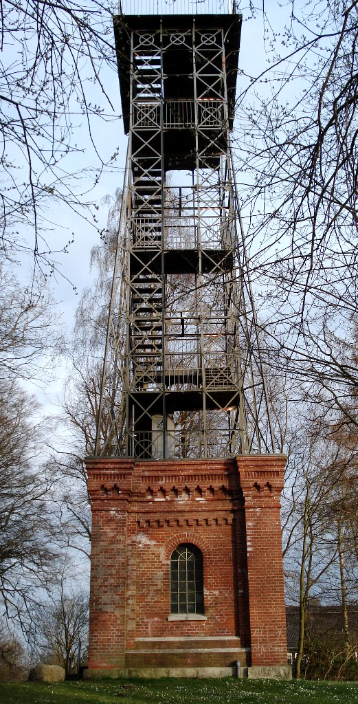 Der Parnassturm in Plön